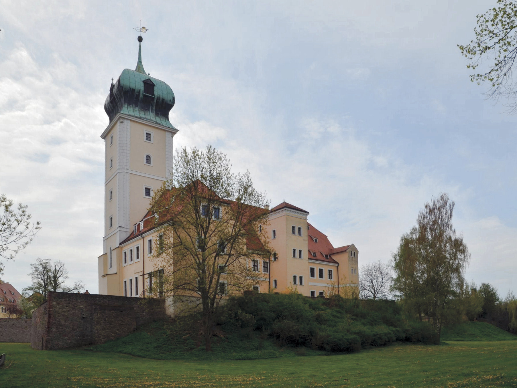 Die Nordseite des Barockschlosses Delitzsch